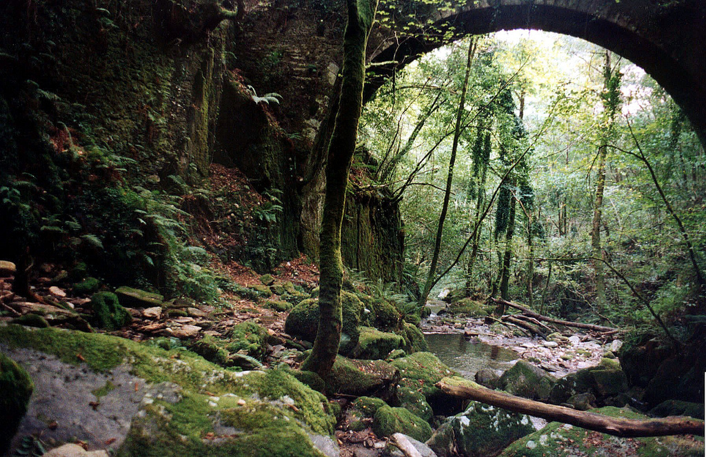 Arco verde (Fragas do Eume). Mosteiro de Caaveiro, no concello da Capela